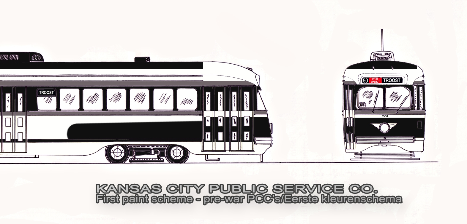 Zelfgetekende media, gescand en ingekleurd met Photoshop CS Categorie:Afbeelding tram